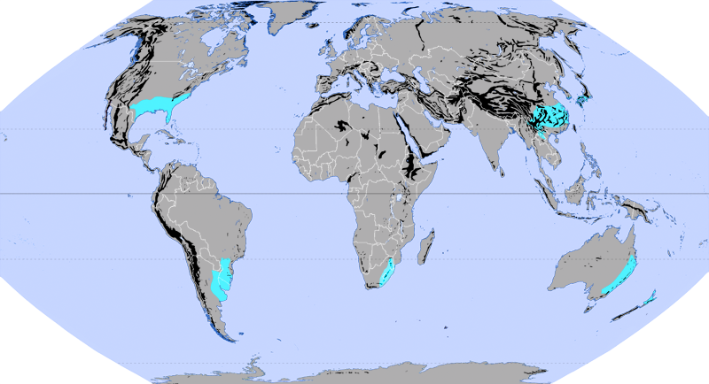 Auszug der Karte Ökozonen nach Jürgen Schultz